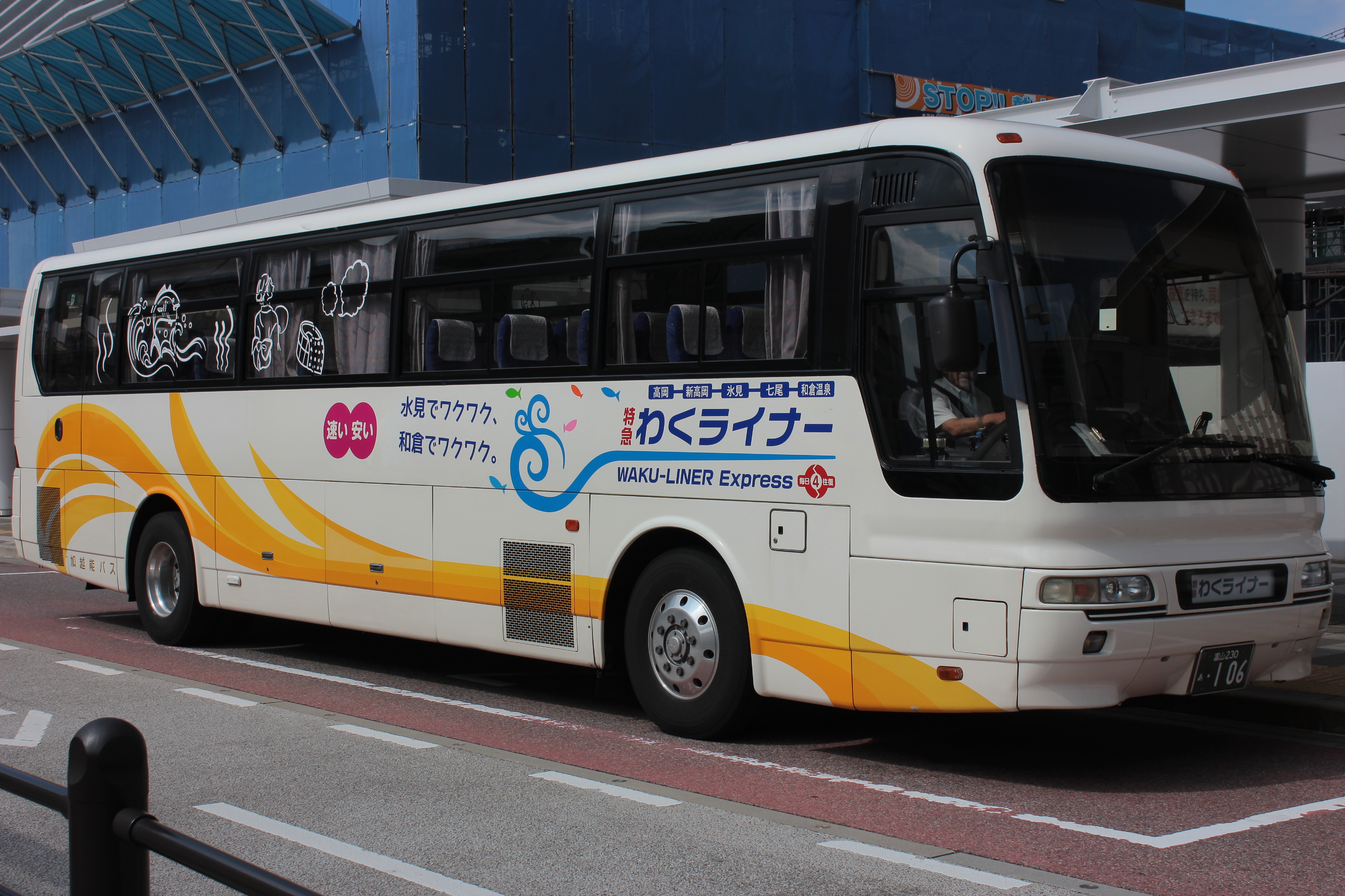 加越能バスの「わくライナー」（高岡駅前）、高岡駅と和倉温泉を結ぶバスである。 Canon EOS Kiss X5